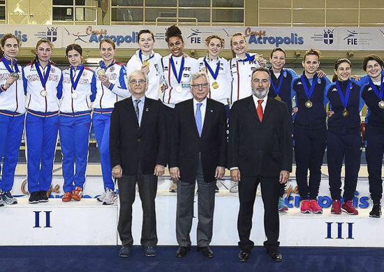 В столице Греции Афинах прошёл командный турнир в рамках этапа Кубка мира по фехтованию на саблях среди женщин. Сборная России завоевала серебро, уступив Франции 45:32